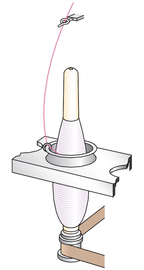 Funcionamento do filatório anel